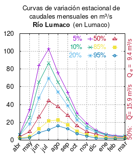 Curva de Variación Estacional Río Lumaco en Lumaco. # cita publicación # | apellido = Dirección General de Aguas # | nombre = # | enlace-autor = Ministerio de Obras Públicas (Chile) # | título = Diagnóstico y clasificación de los cursos y cuerpos de agua según objetivos de calidad. Cuenca del río Imperial # | ubicación = Santiago de Chile # | editorial = Ministerio de Obras Públicas (Chile) # | año = 2004 # | edición = # | url = # | ref = harv # Río Lumaco en Lumaco, pág. 45 mes 5% 10% 20% 50% 85% 95% Abr 7.185 6.271 5.303 3.808 2.46 1.86 May 34.273 25.661 18.076 9.246 4.05 2.495 Jun 84.291 65.106 47.622 26.18 12.531 8.131 Jul 102.809 86.638 69.779 44.316 21.697 11.434 Ago 75.985 65.372 54.308 37.596 22.751 16.015 Sep 53.724 46.446 38.86 27.401 17.222 12.604 Oct 30.552 26.607 22.416 15.905 9.993 7.347 Nov 18.708 16.156 13.494 9.475 5.904 4.284 Dic 10.927 9.966 8.802 6.576 3.835 2.225 Ene 6.433 5.92 5.299 4.111 2.649 1.79 Feb 5.01 4.625 4.158 3.266 2.167 1.522